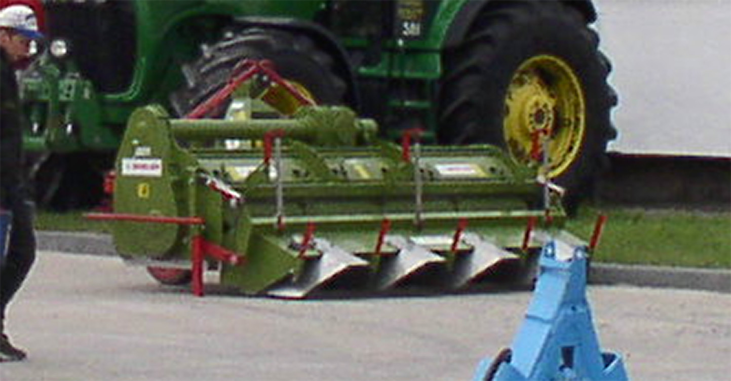 Kartoffeldammfräse, Belagro 2007, Minsk